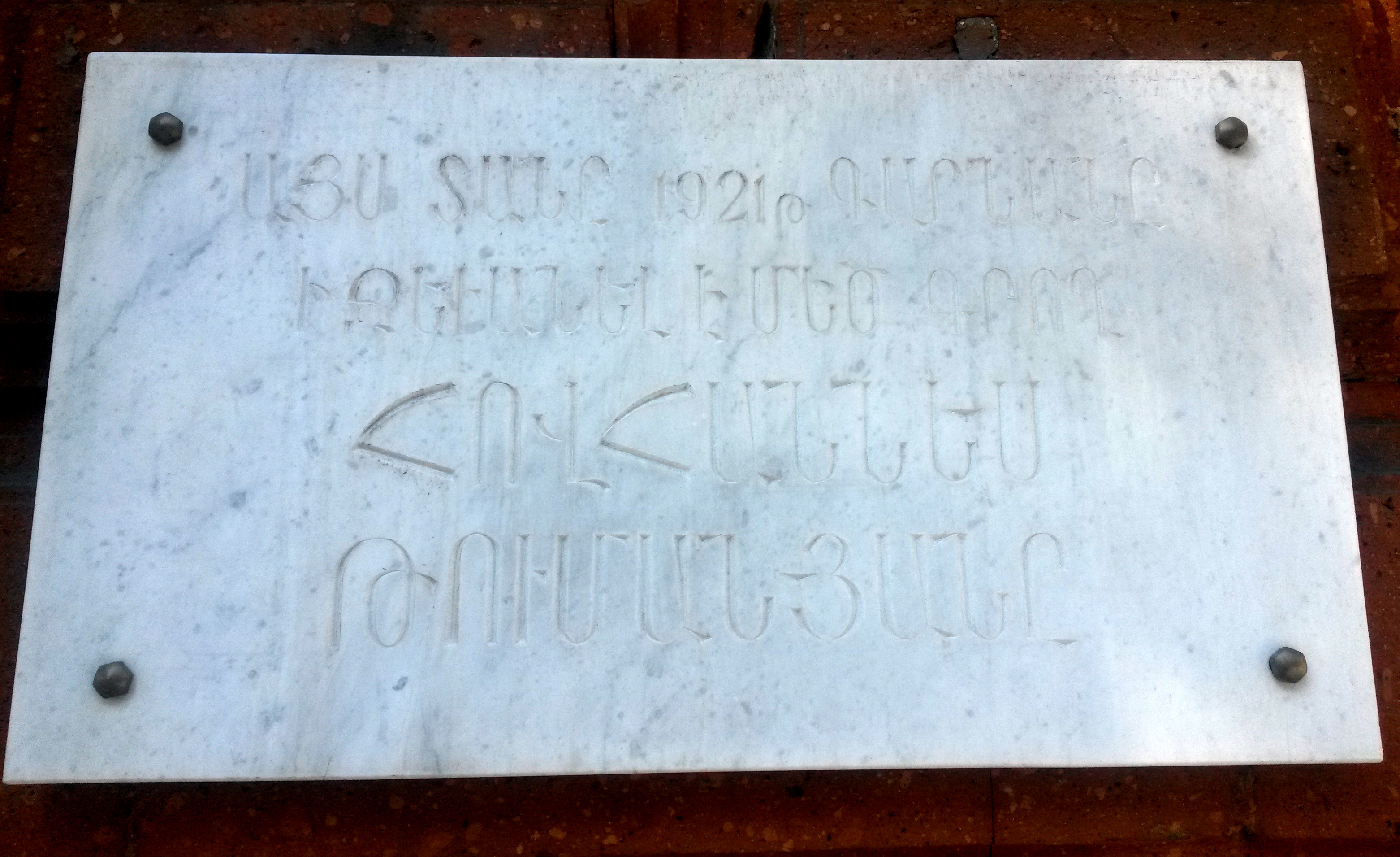 Հուշատախտակ Երևանի Աբովյան 1 հասցեում. «Այս տանը 1921 թվականի գարնանը իջևանել է մեծ գրող Հովհաննես Թումանյանը»